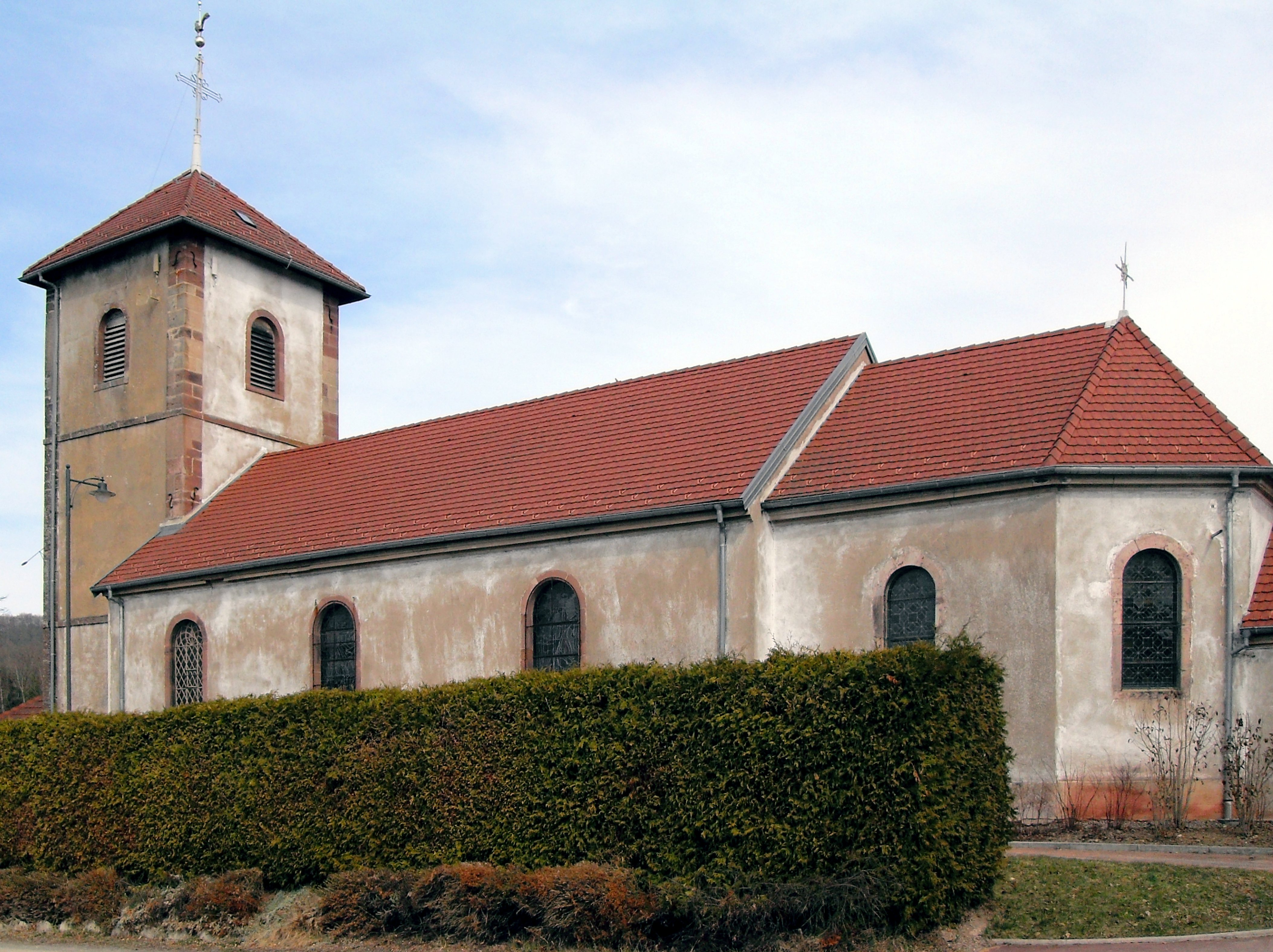 L'église Saint-Georges à Grosmagny